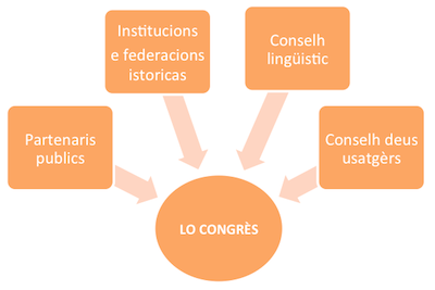 Organigrama deu Congrès